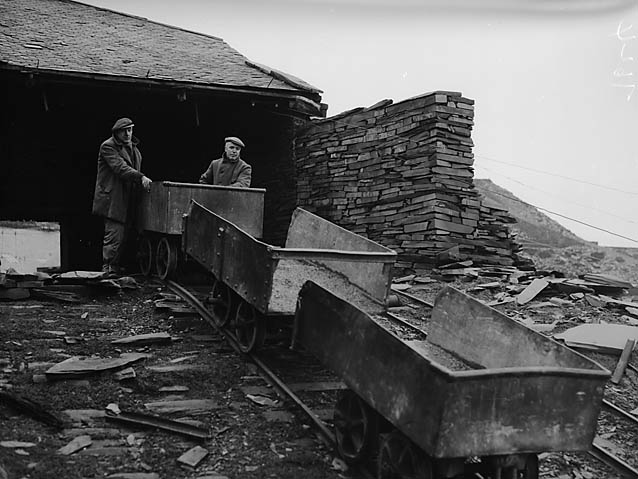 Teitl Cymraeg/Welsh title: Nodwedd arbennig "Y Cymro" ar chwarel lechi Y Llechwedd, Blaenau Ffestiniog Ffotograffydd/Photographer: Geoff Charles (1909-2002) Dyddiad/Date: 28/1/1955 Cyfrwng/Medium: Negydd ffilm / Film negative Cyfeiriad/Reference: (gch07624) Rhif cofnod / Record no.: 3368392 Rhagor o wybodaeth am gasgliad Geoff Charles yn Llyfrgell Genedlaethol Cymru More information about the Geoff Charles Collection at the National Library of Wales Mae ffotograffau Geoff Charles hefyd yn rhan o Broject Europeana Libraries Geoff Charles' photographs also form part of the Europeana Libraries Project